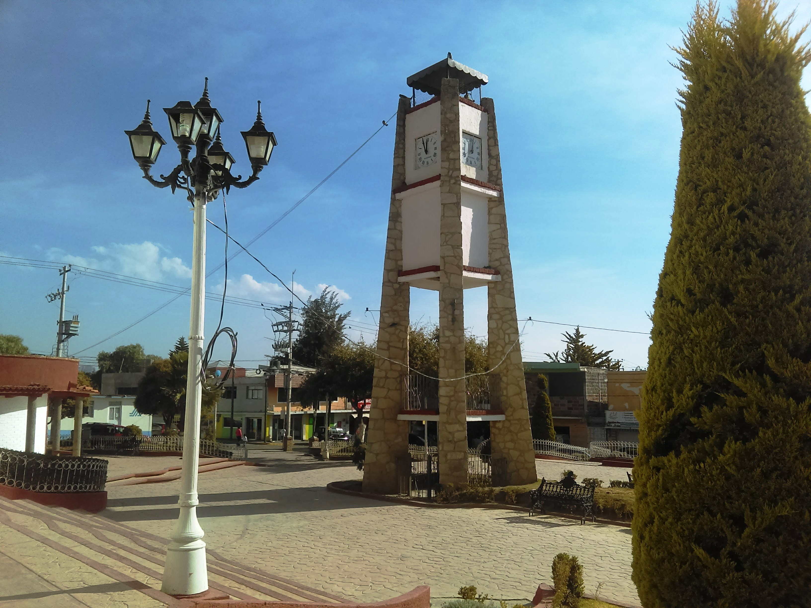 Reloj de Pachuquilla